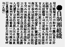 1919년 박중양의 자제단 조직 뉴스 기사